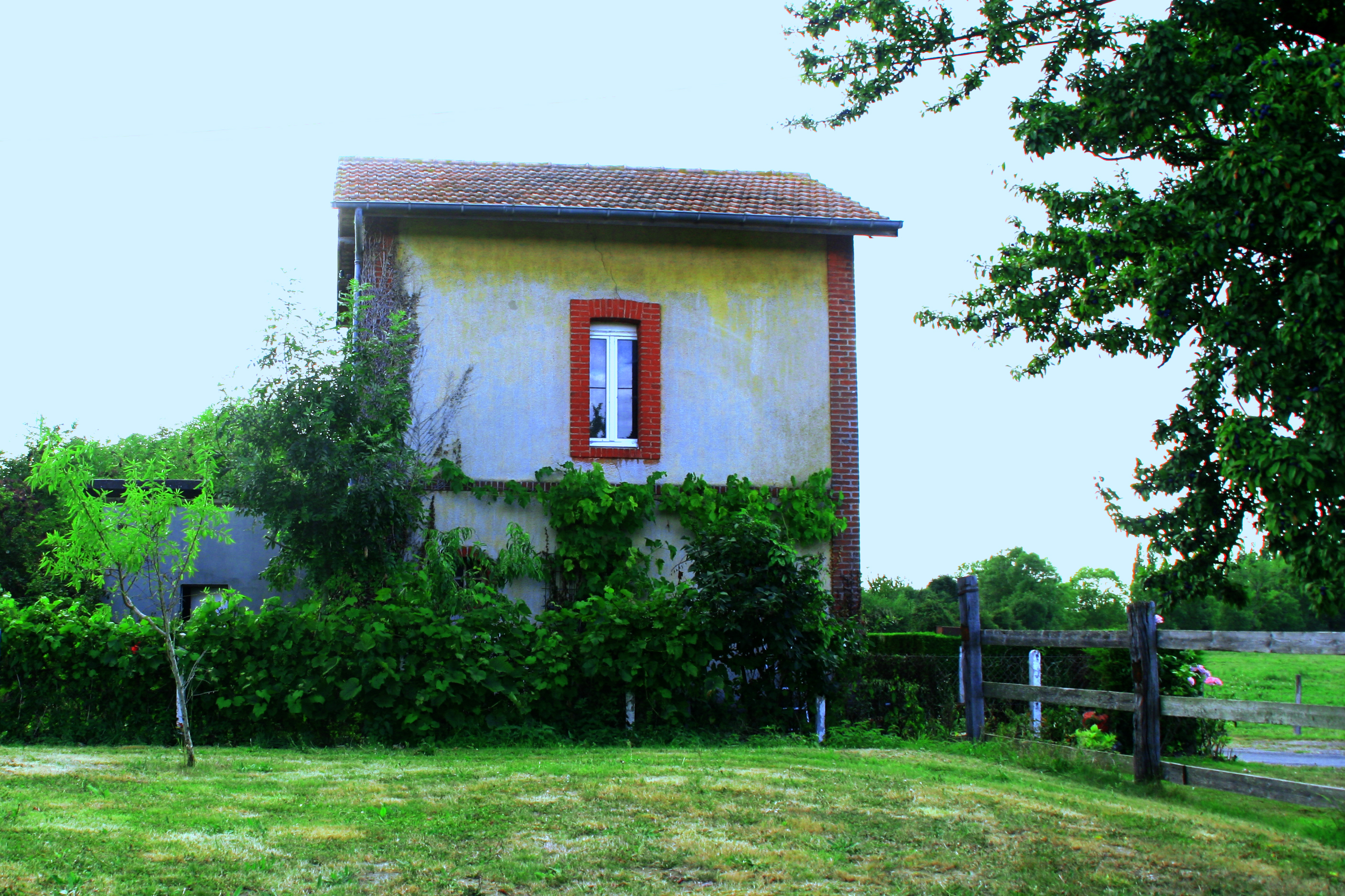 Ancienne halte de Brucourt sur l'ancienne ligne de chemin de fer reliant Mézidon à Trouville-Deauville.